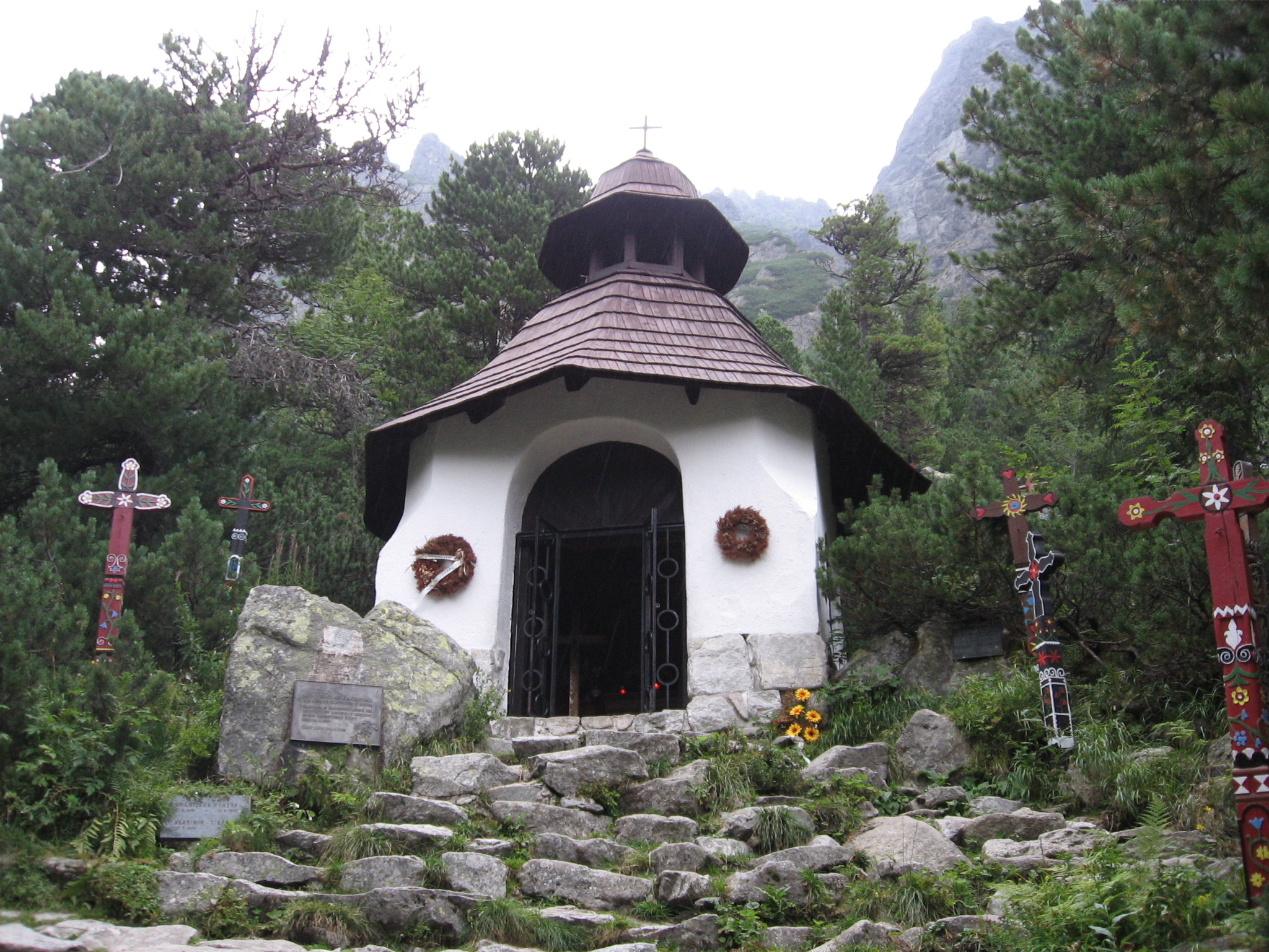 Symbolický cintorín pri Popradskom plese pod strmou skalnou stenou Ostrvy je miestom, kde sú na pamiatku obetiam Vysokých Tatier umiestnené pamätné tabule s menami ľudí, ktorí zahynuli vo Vysokých Tatrách, ale kde nie je nikto pochovaný.